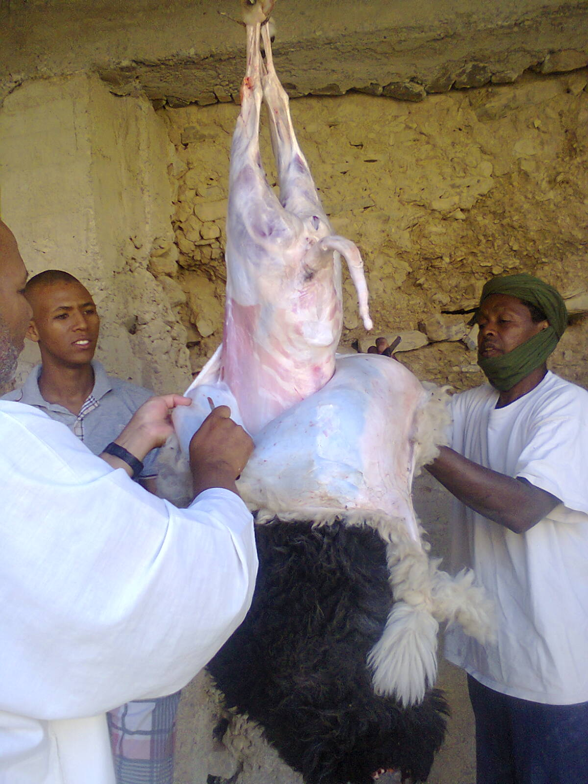 aid al adha atata maroc taldnont This is an image of food from Morocco